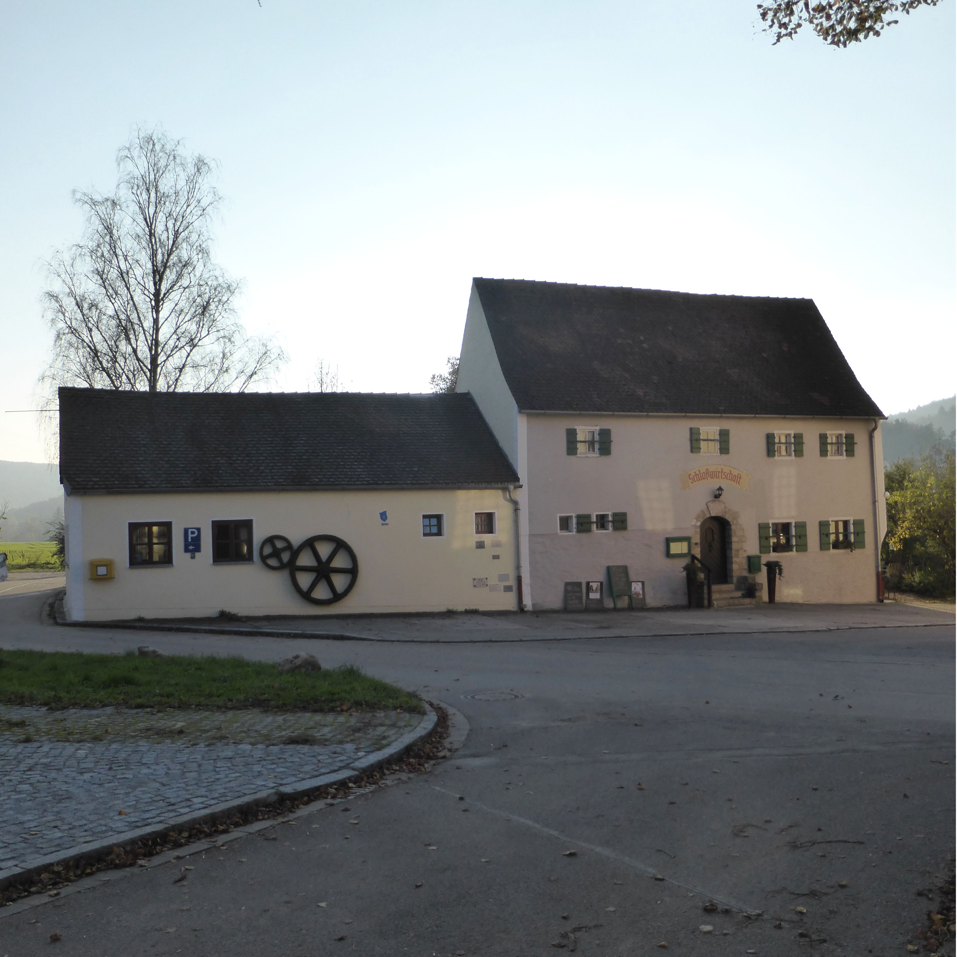 Heitzenhofen (Schlossgaststätte)